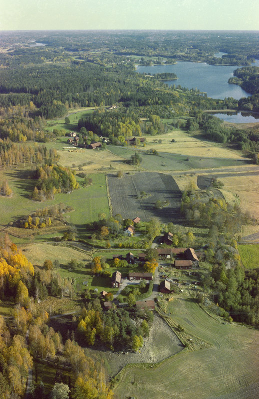 Västra Granhed och Östra Granhed. Bilden är tagen mot (väderstreck): OSO Motiv: Granhed Nyckelord: Flygbilder, Riksintressen Kategori: JordbruksbyVästra Granhed och Östra Granhed. Bilden är tagen mot (väderstreck): OSO.